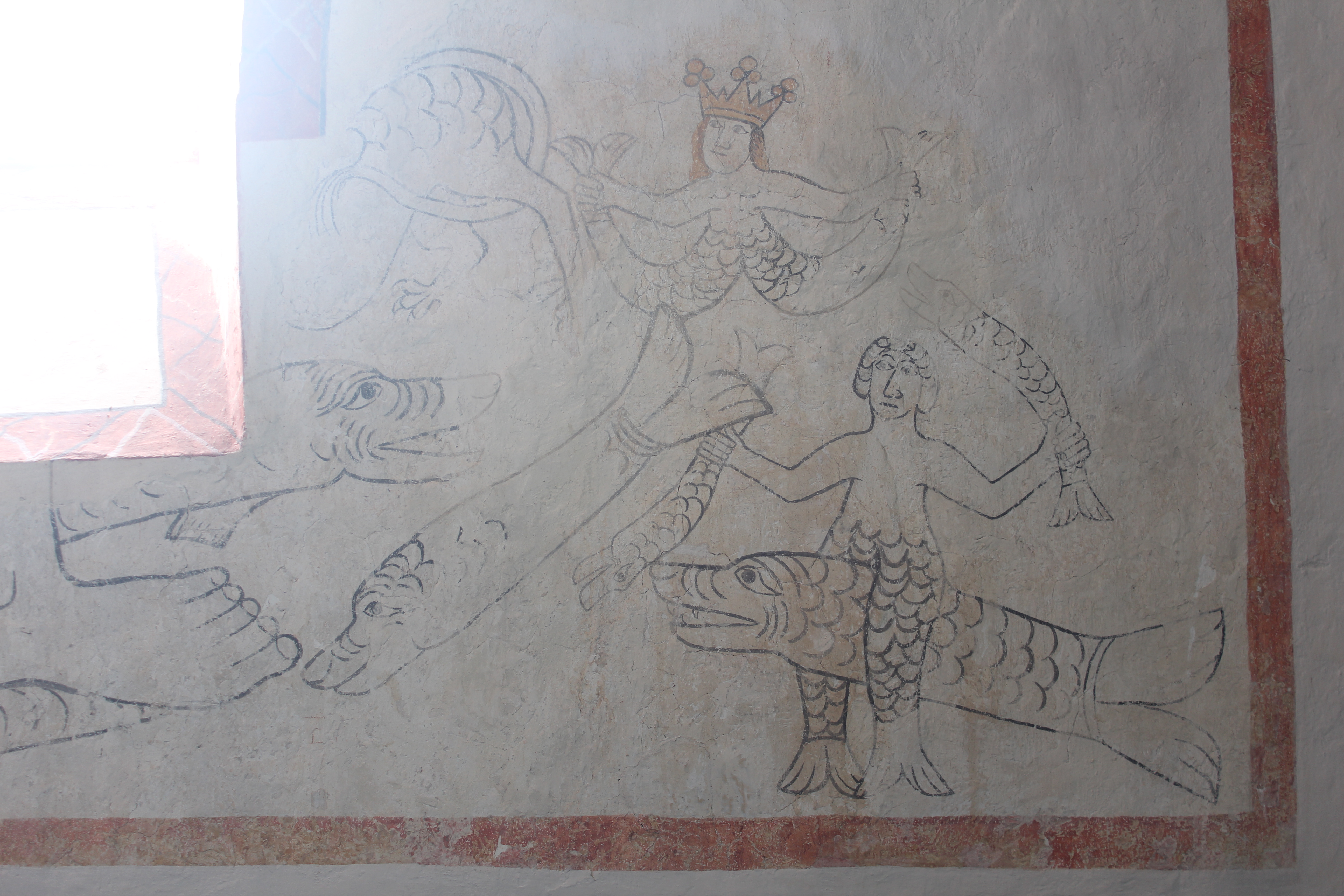 Wandgemälde in der Evangelischen Kirche zu Hohenahr-Erda